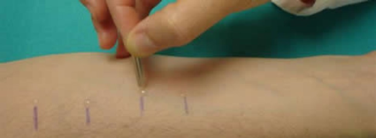 Prueba de alergia